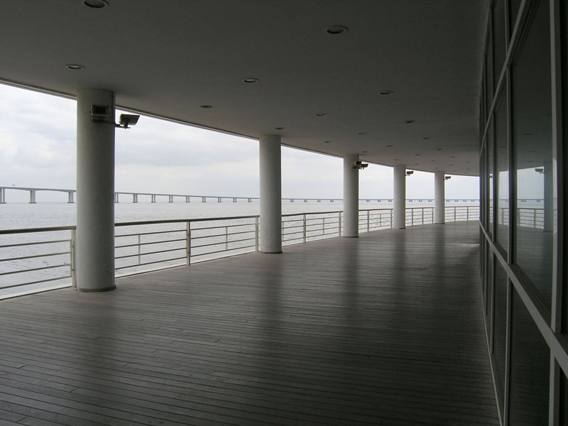 Torre Vasco da Gama, Lissabon, Portugal